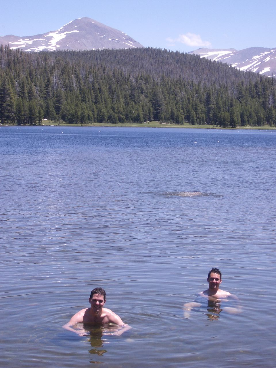 Dog Lake, Yosemite USA